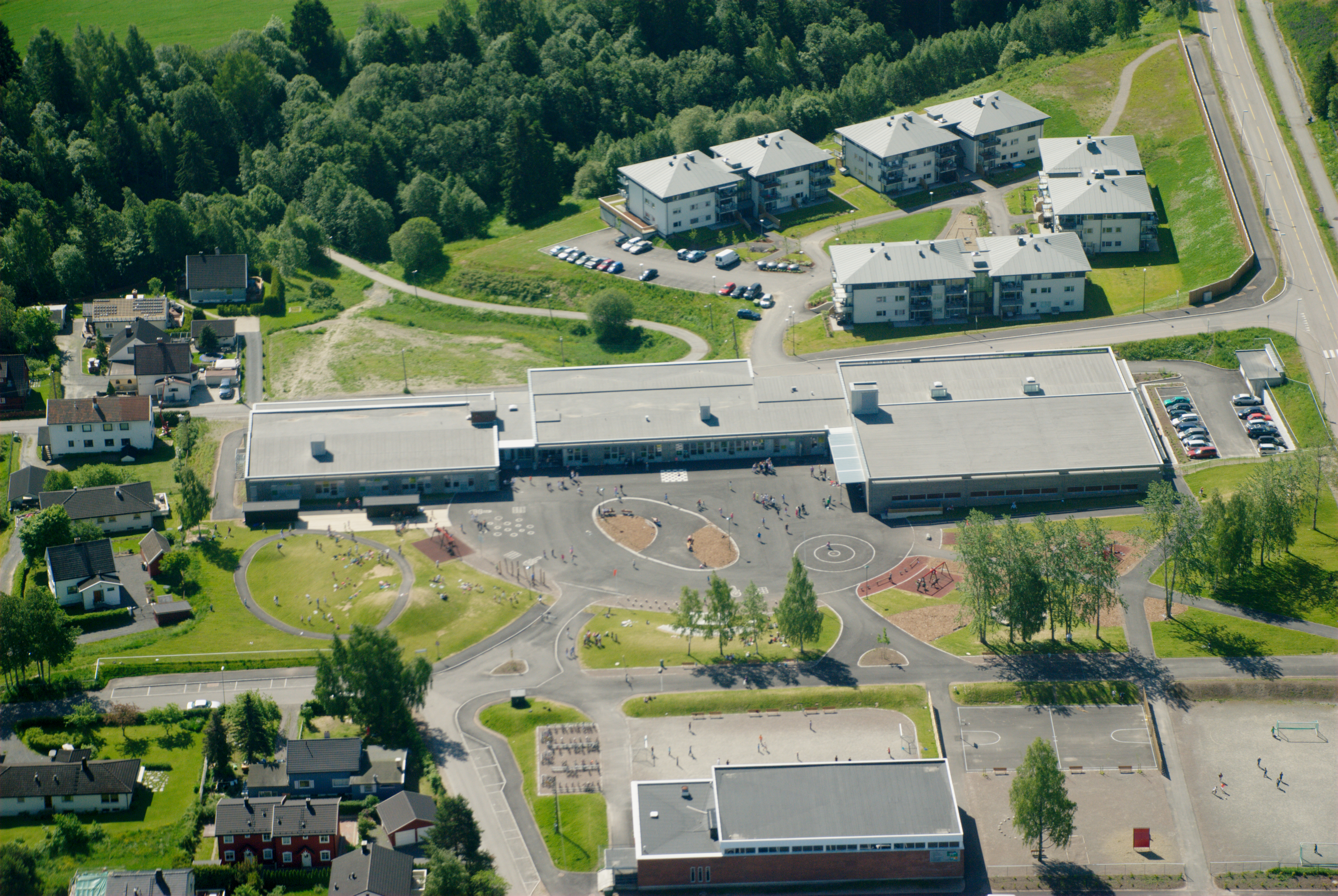 Skjetten skole, Skedsmo kommune, at the north-east edge of Oslo